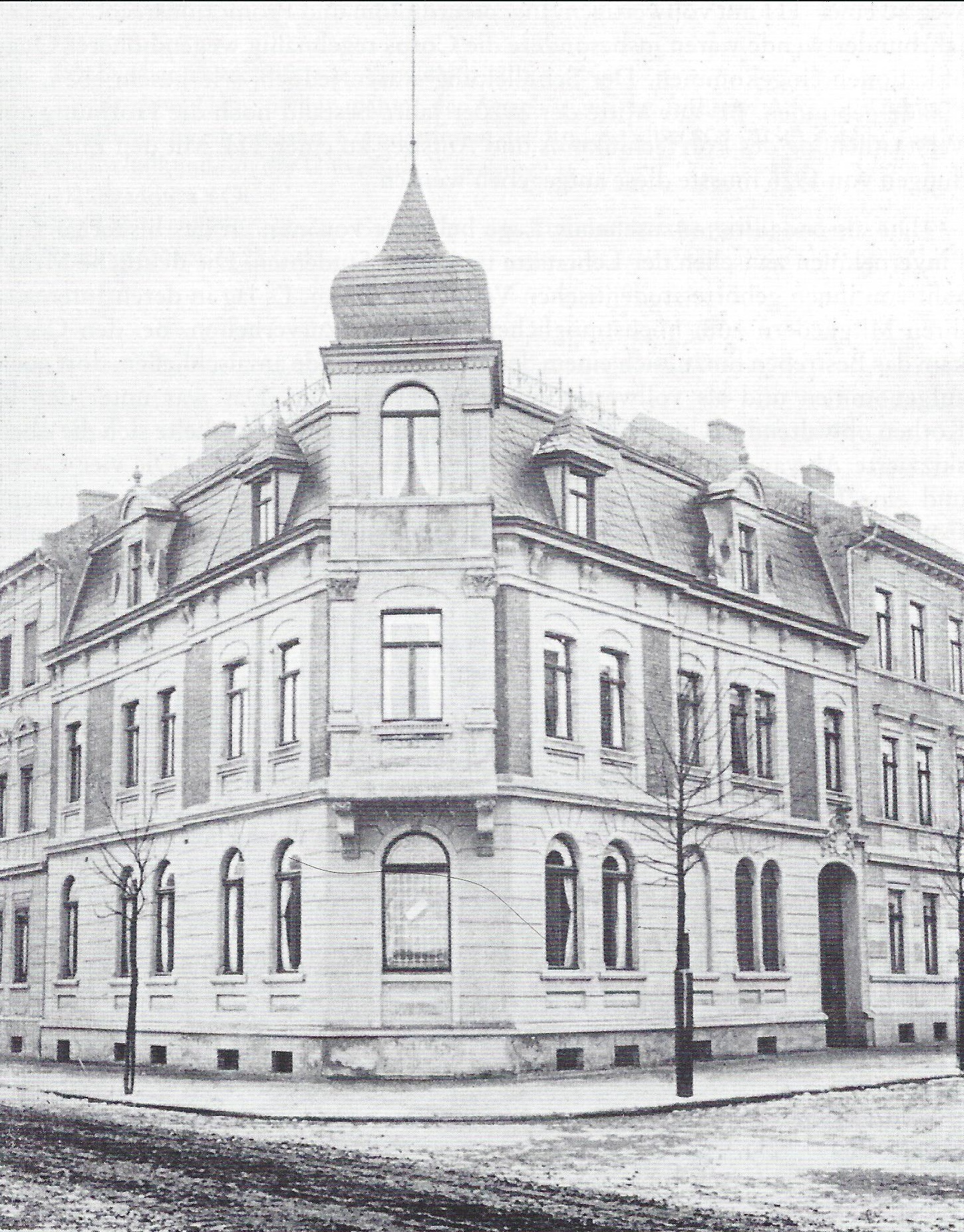 Fotografie vom Corpshaus der Baltia Köthen